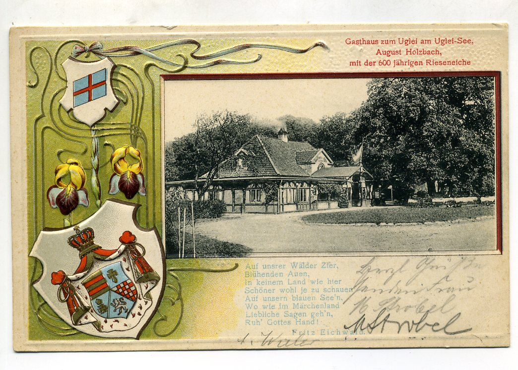 Gasthaus zum Uglei am Uglei-See mit der 600 jährigen Rieseneiche- 1904